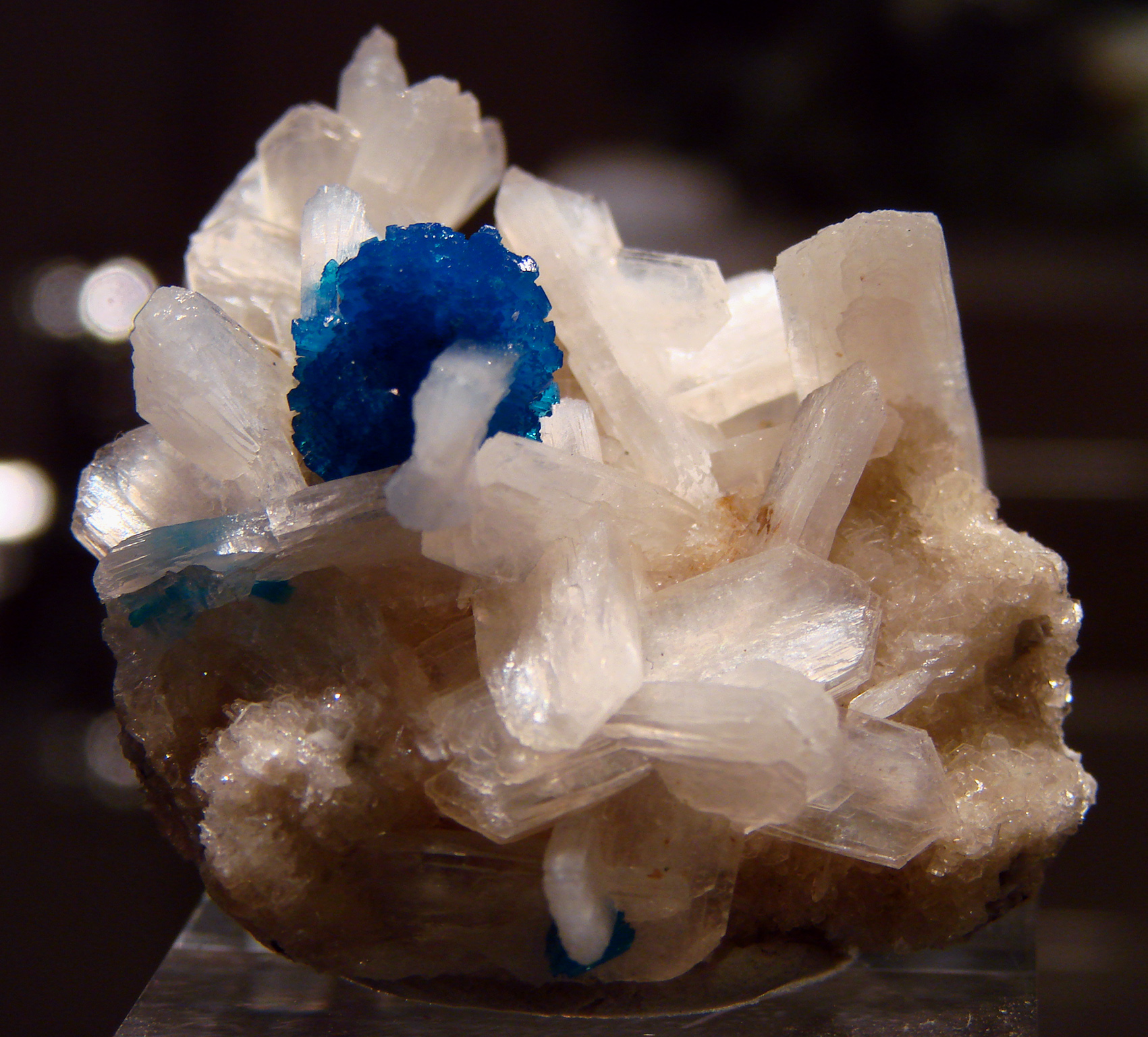 Cavansite sur stilbite, provenance: Inde, Whagoli.